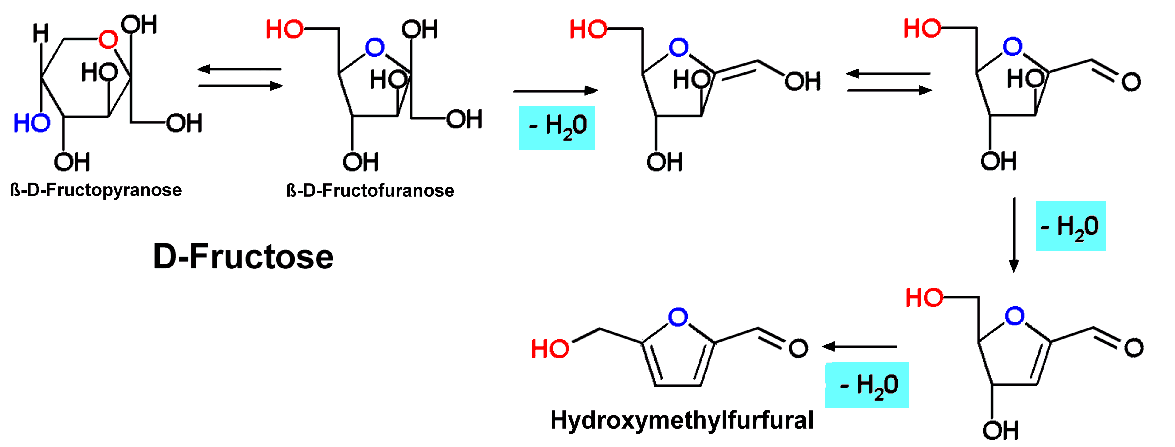 Dehydratisierung von D-Fructose zu Hydroxymethylfurfural (HMF)